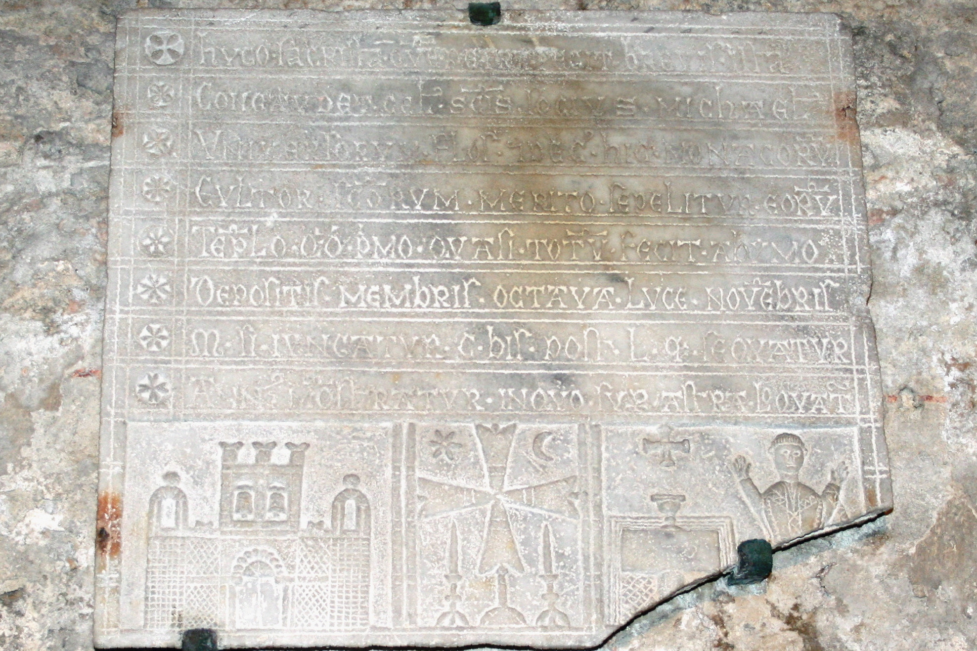 Plaque funéraire de la moitié du XIIIe siècle de Hugues de Glazinis située dans les cryptes de l'abbaye de Saint-Victor à Marseille.